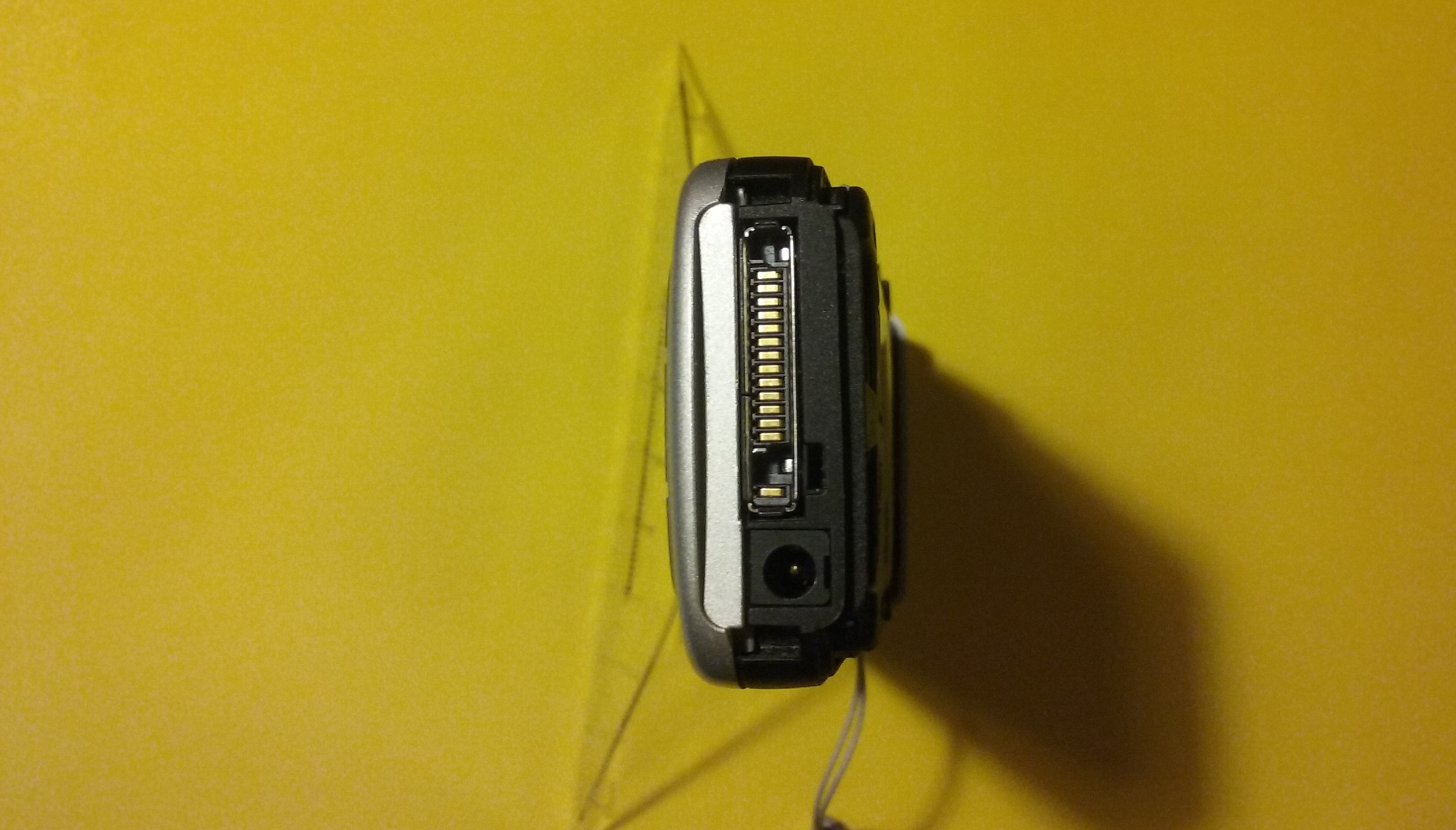 Złącza w Nokii 6020 - zasilające (3,5 mm) i do przesyłu danych